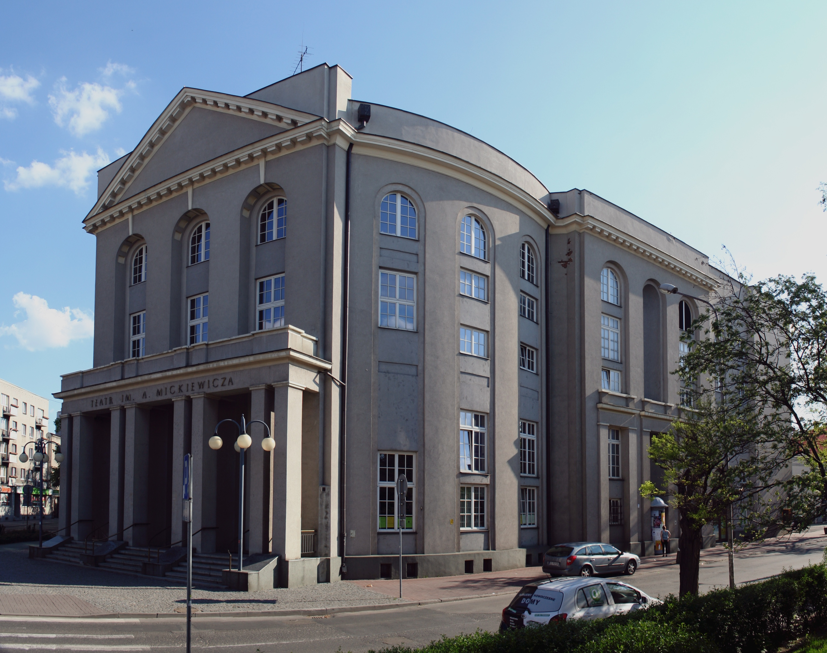 Częstochowa, teatr im. Adama Mickiewicza